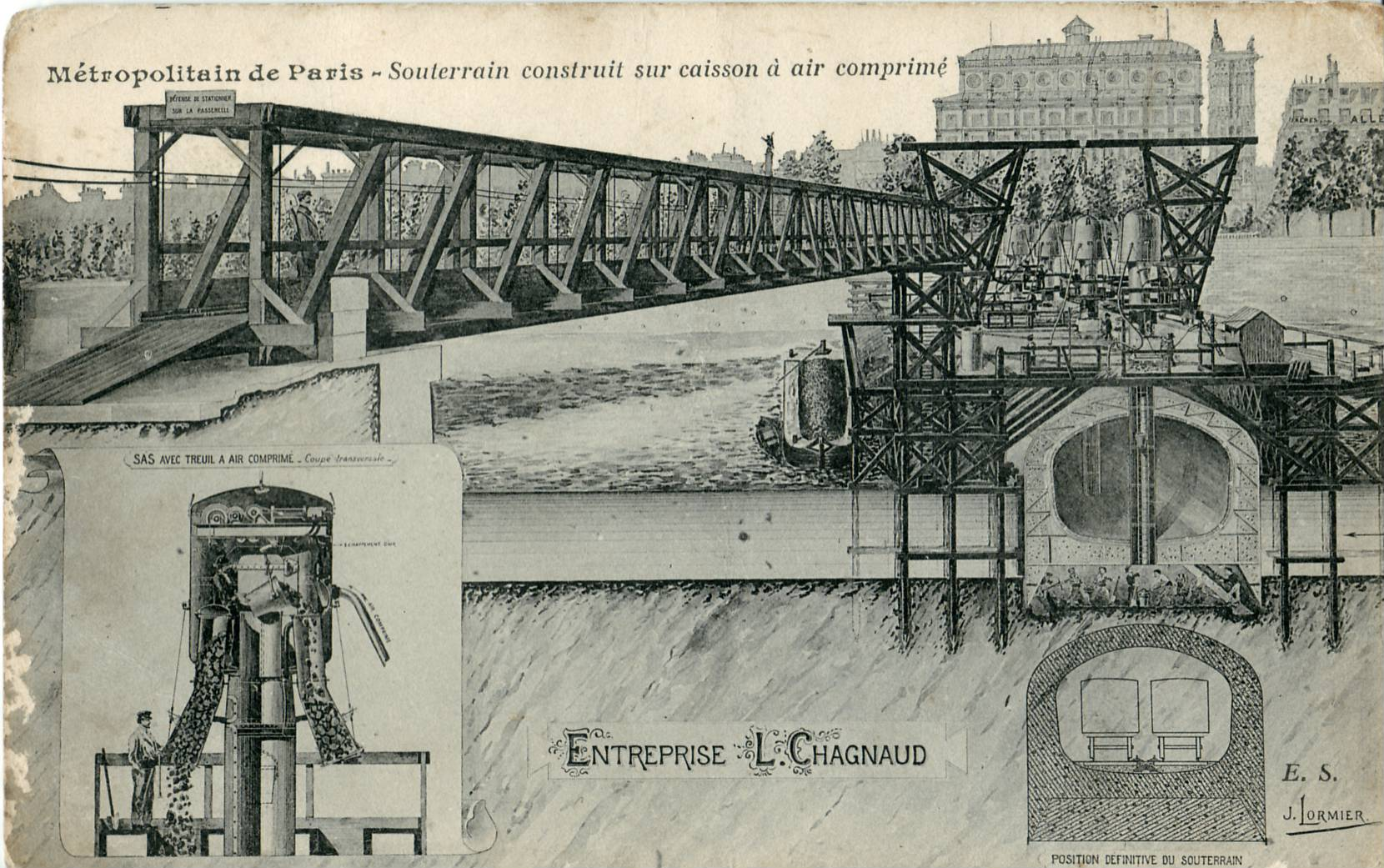 Carte postale ancienne éditée par MalcuitMétropolitain de Paris : réalisation de la traversée sous-fluviale de la ligne 4 du métro de Paris, par la méthode des caissons sous pression d'air (Publicité de l'Entreprise Chagnaud)